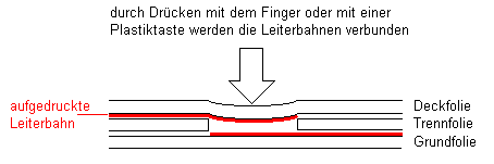 Zeichnung einer Taste in einer Folientastatur